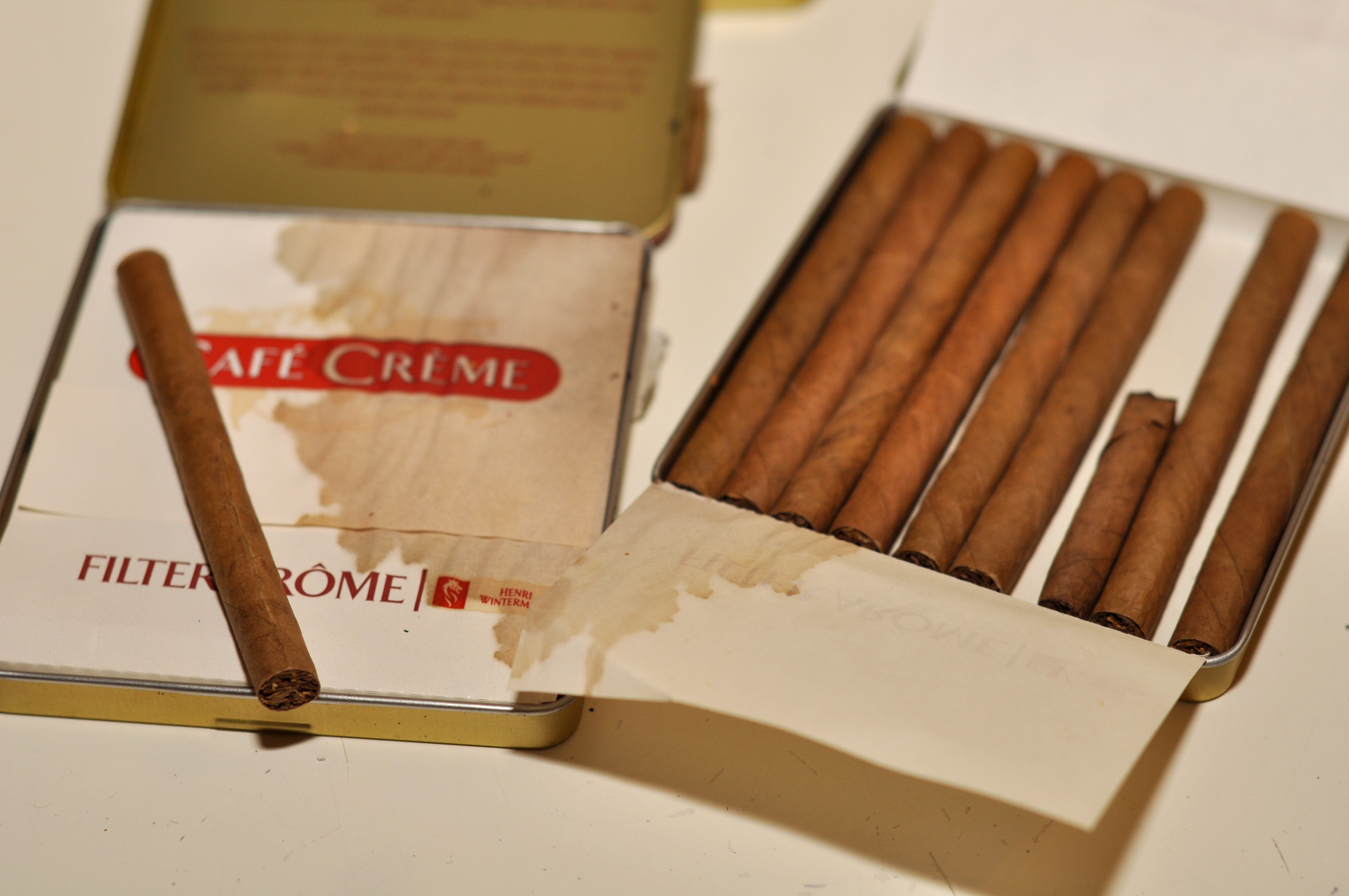 En fedtet pak' Café Crème Filter Arôme